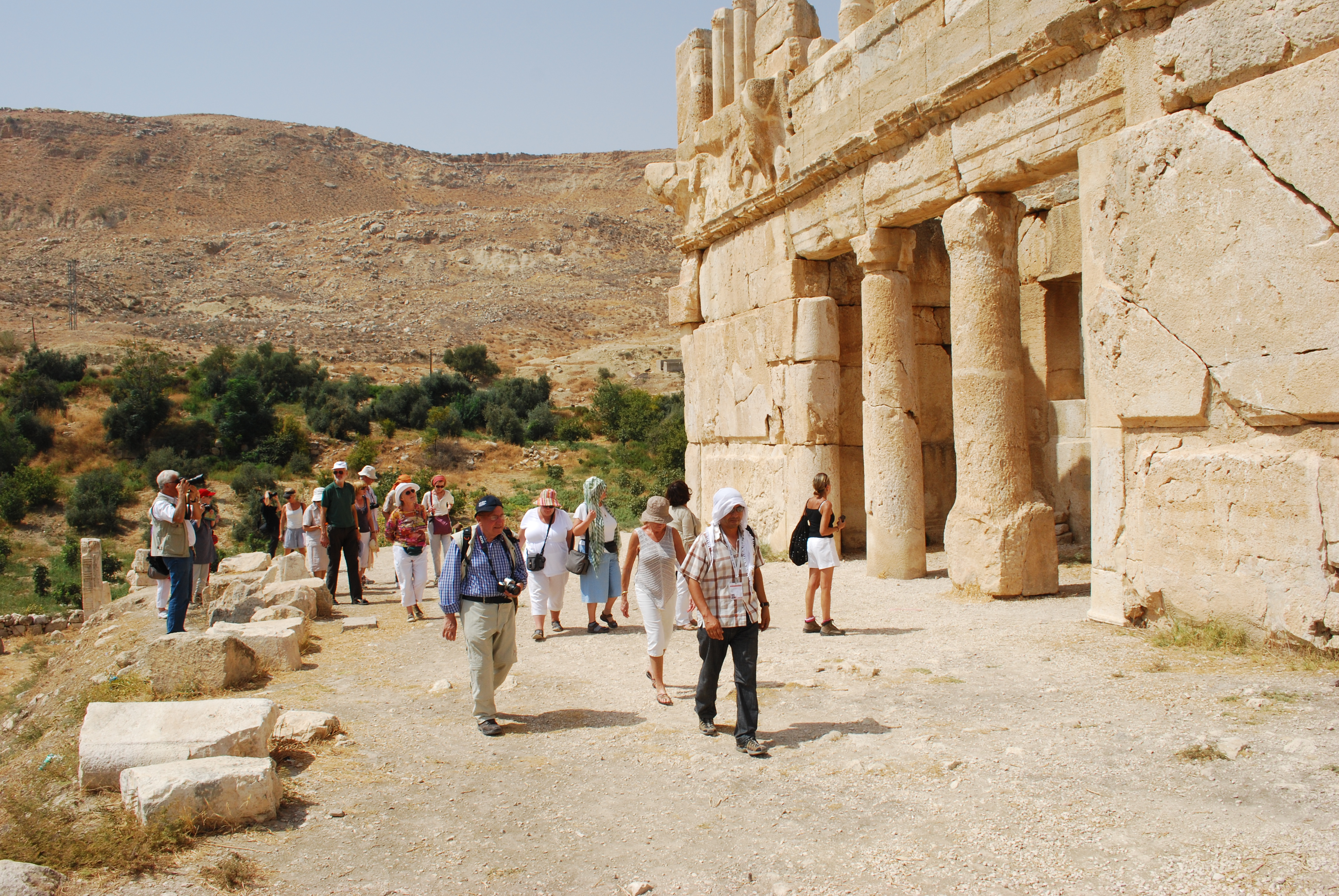 Le château d'Iraq al Amir : façade sud.